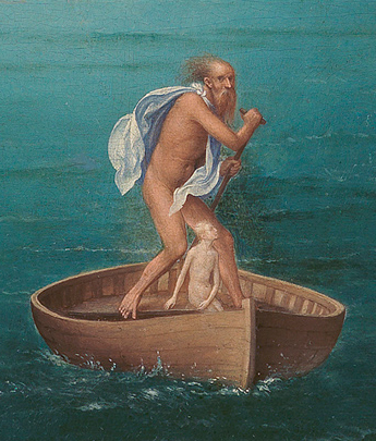 Joachim Patinier, Passage du Styx, détail : Charon